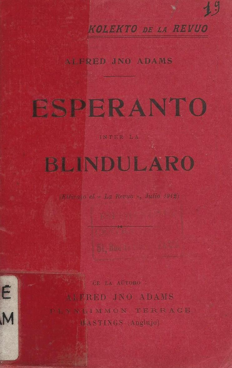 kovrilo de libro "Esperanto inter la blindularo", 1913